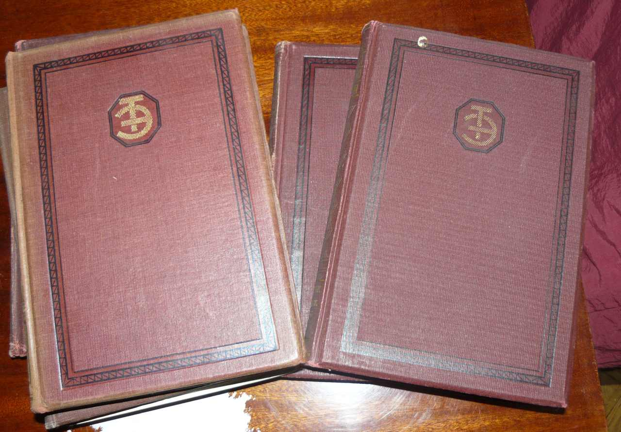 Техническая энциклопедия 1927 года - внешний вид